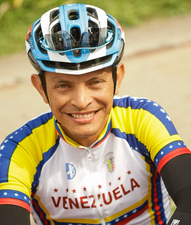 Manuel Medina, ciclista venezolano en la Vuelta a Guatemala 2013